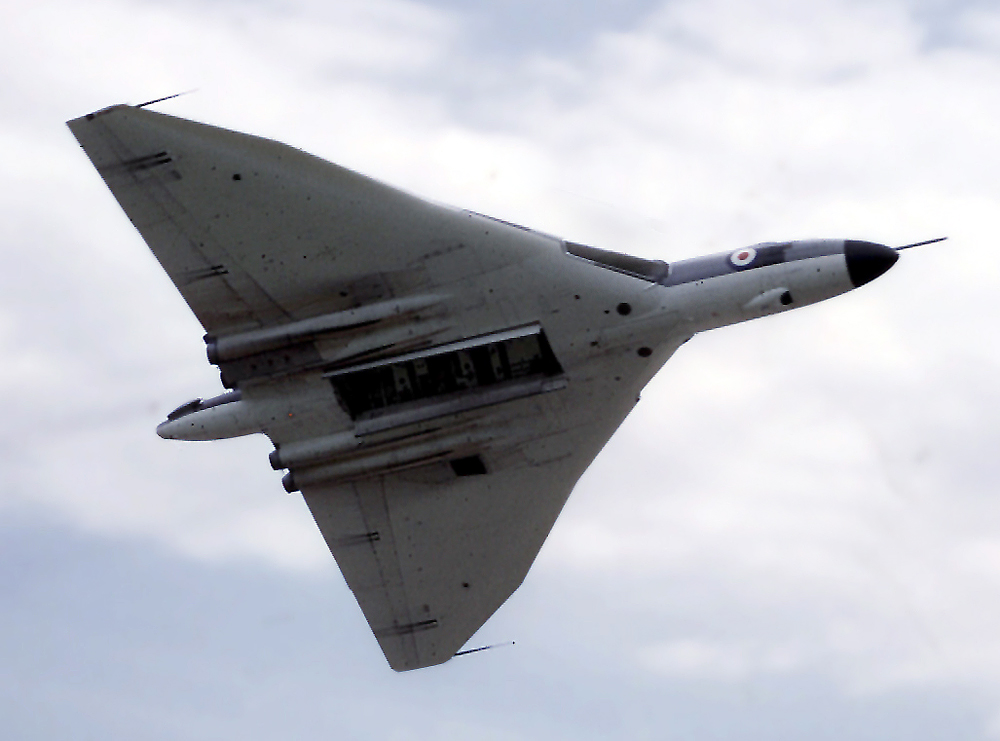 El bombardero Vulcan de ala delta A delta-wing Javelin bomber lands at Filton Airfield, Bristol, England. Date unknown but perhaps the mid-sixties. Registration unknown. Photographed by Adrian Pingstone and released to the public domain.